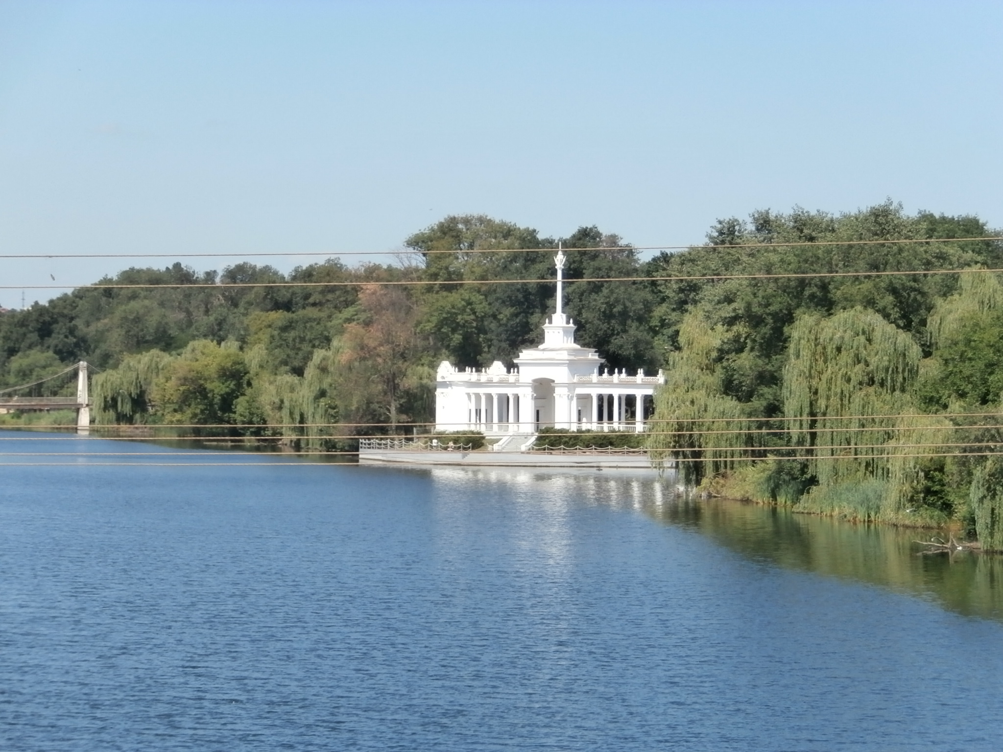 Mündung der Saksahan in die Inhulez in Krywyj Rih